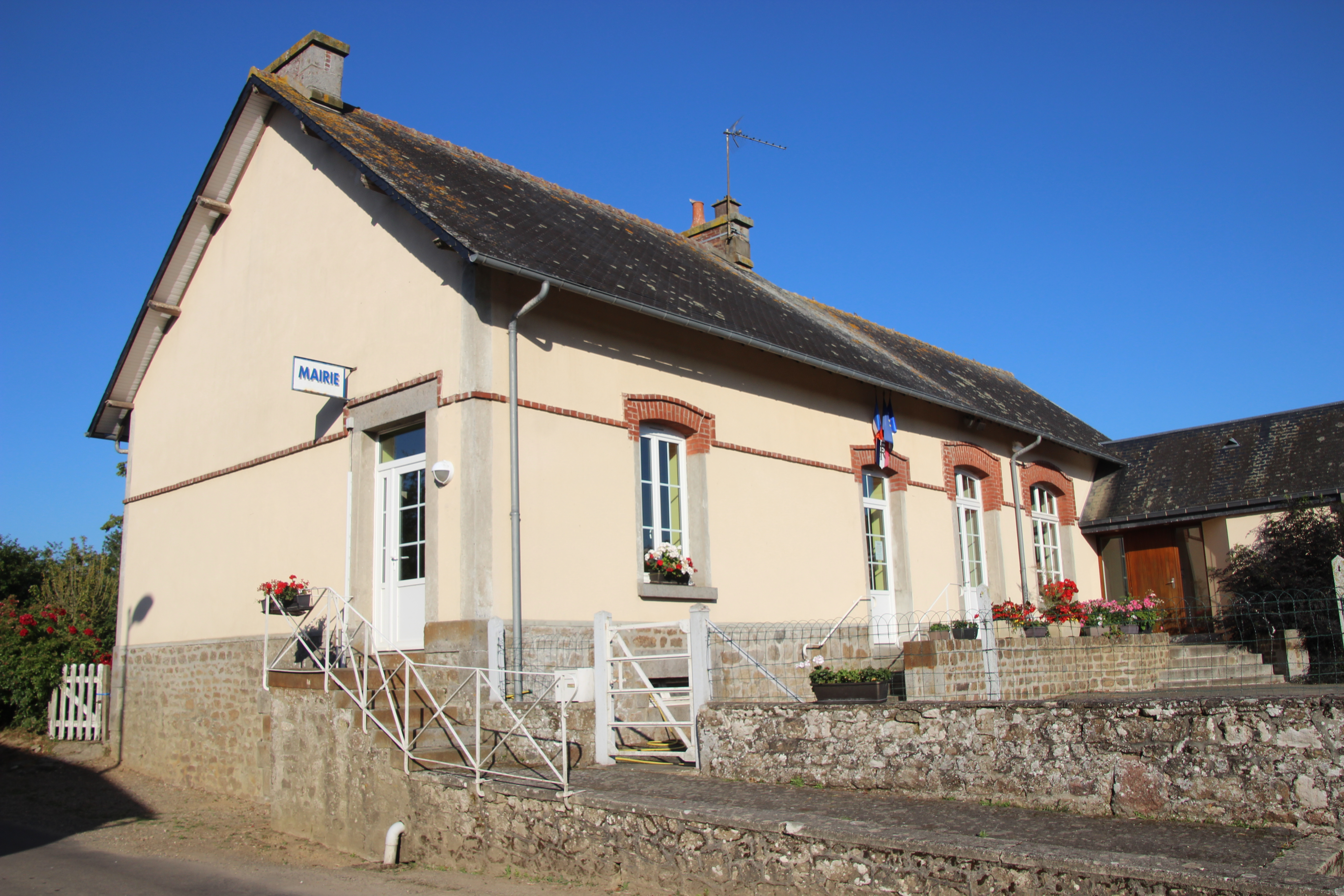 mairie de Lignou